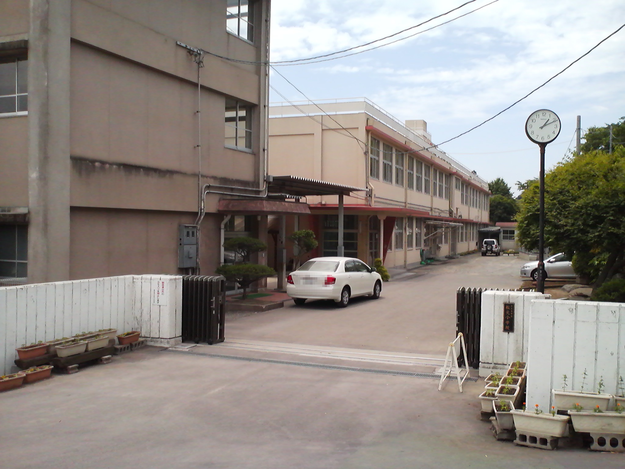 鹿児島市立松元小学校の外観。